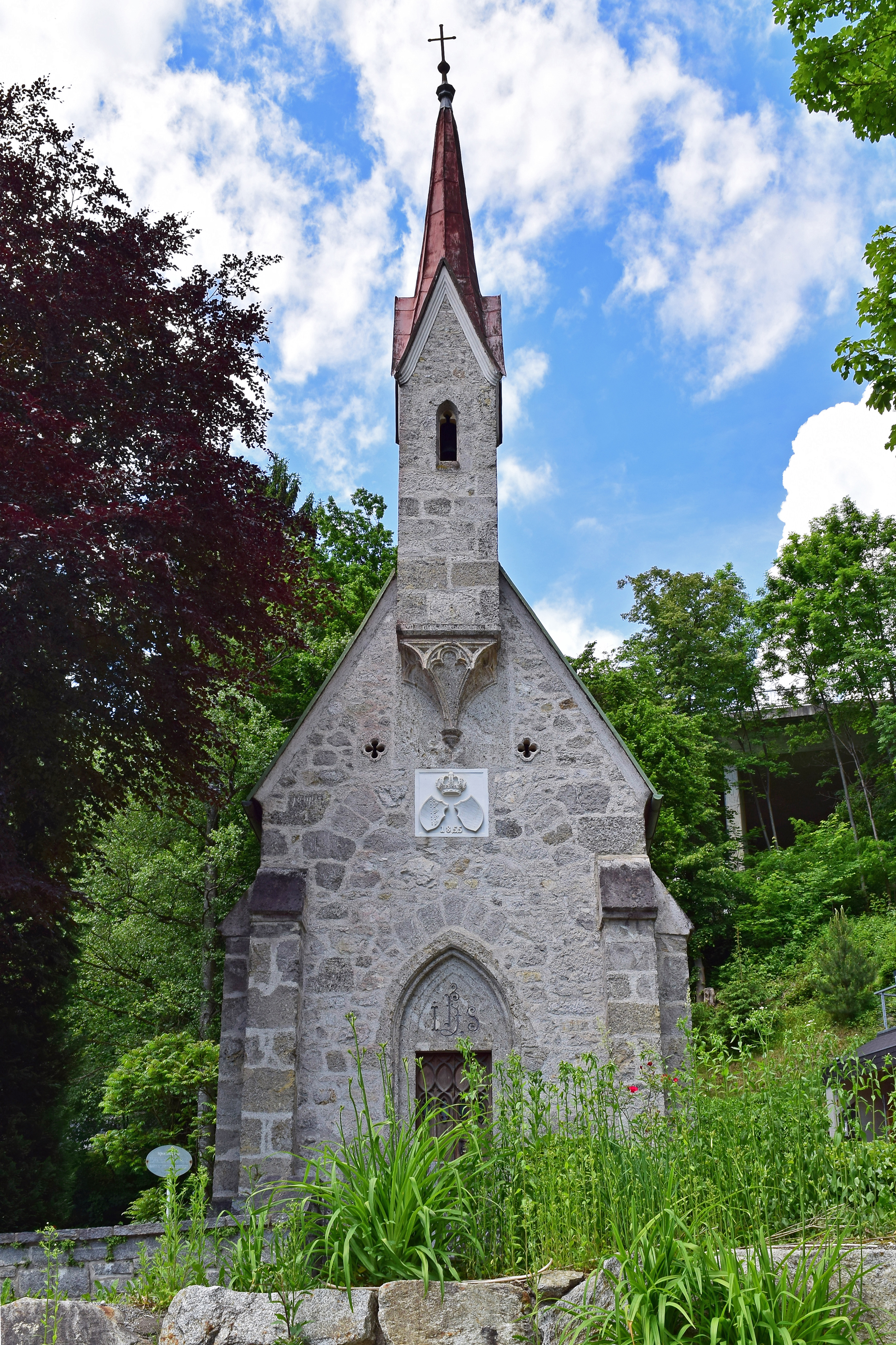 Die Königskapelle in Karrösten wurde im 19. Jahrhundert als Erinnerung an den tödlichen Verkehrsunfall von König Friedrich August II. im Sommer 1854 errichtet. This media shows the remarkable cultural object in the Austrian state of Tyrol listed by the Tyrolean Art Cadastre with the ID 20044. (on tirisMaps, pdf, more images on Commons, Wikidata)